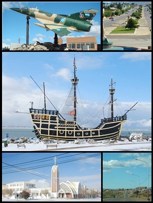 Montaje de San Julián, Patagonia Argentina